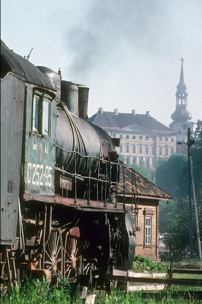 Auruvedur pildistatuna tõenäoliselt 1990. aastate alguses Tallinnas Suurtüki tänava juures. Endise naftamaja kõrval. Pildi autor teadmata.